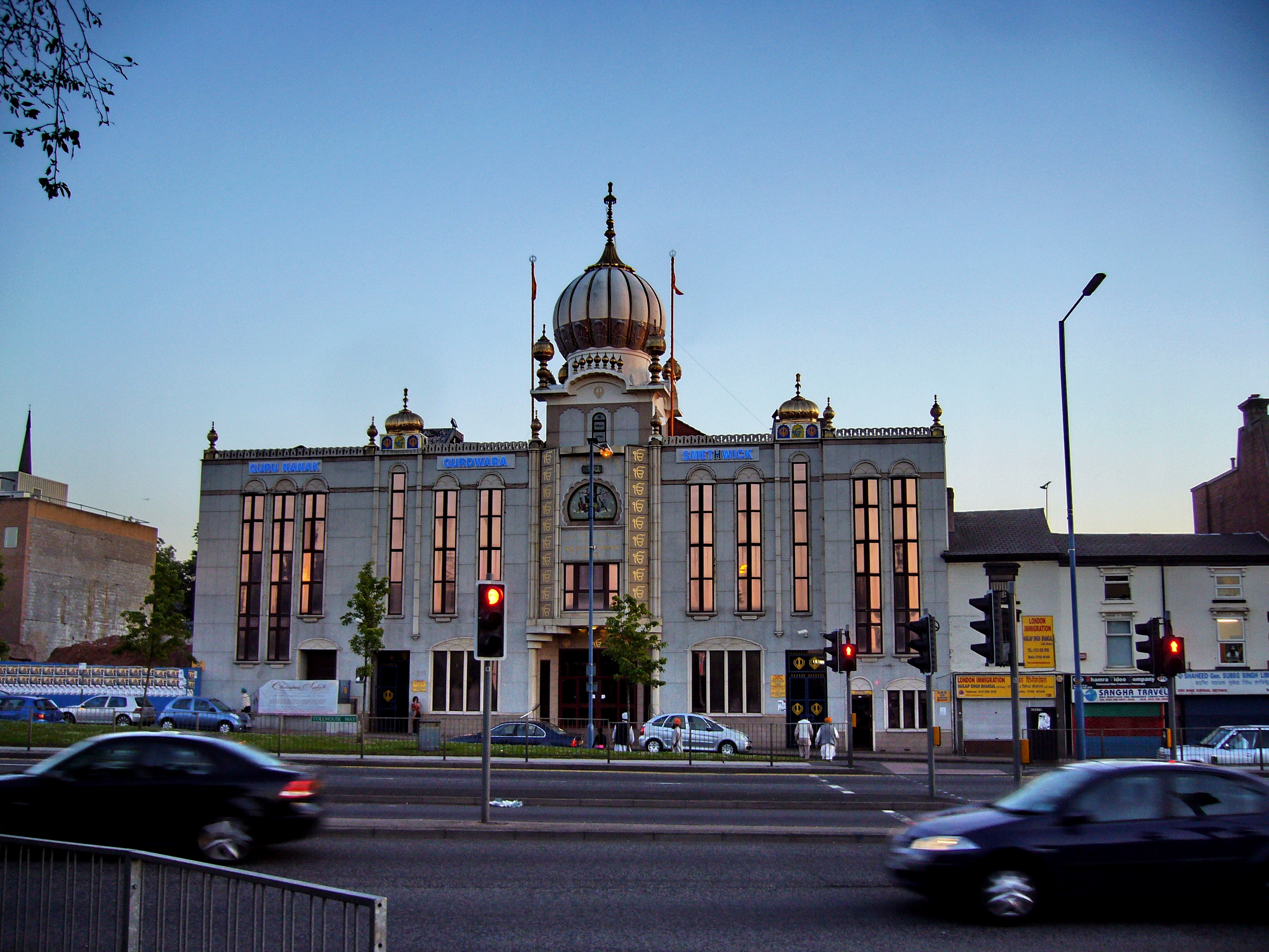 Smethwick - Guru Nanak Gurdwara